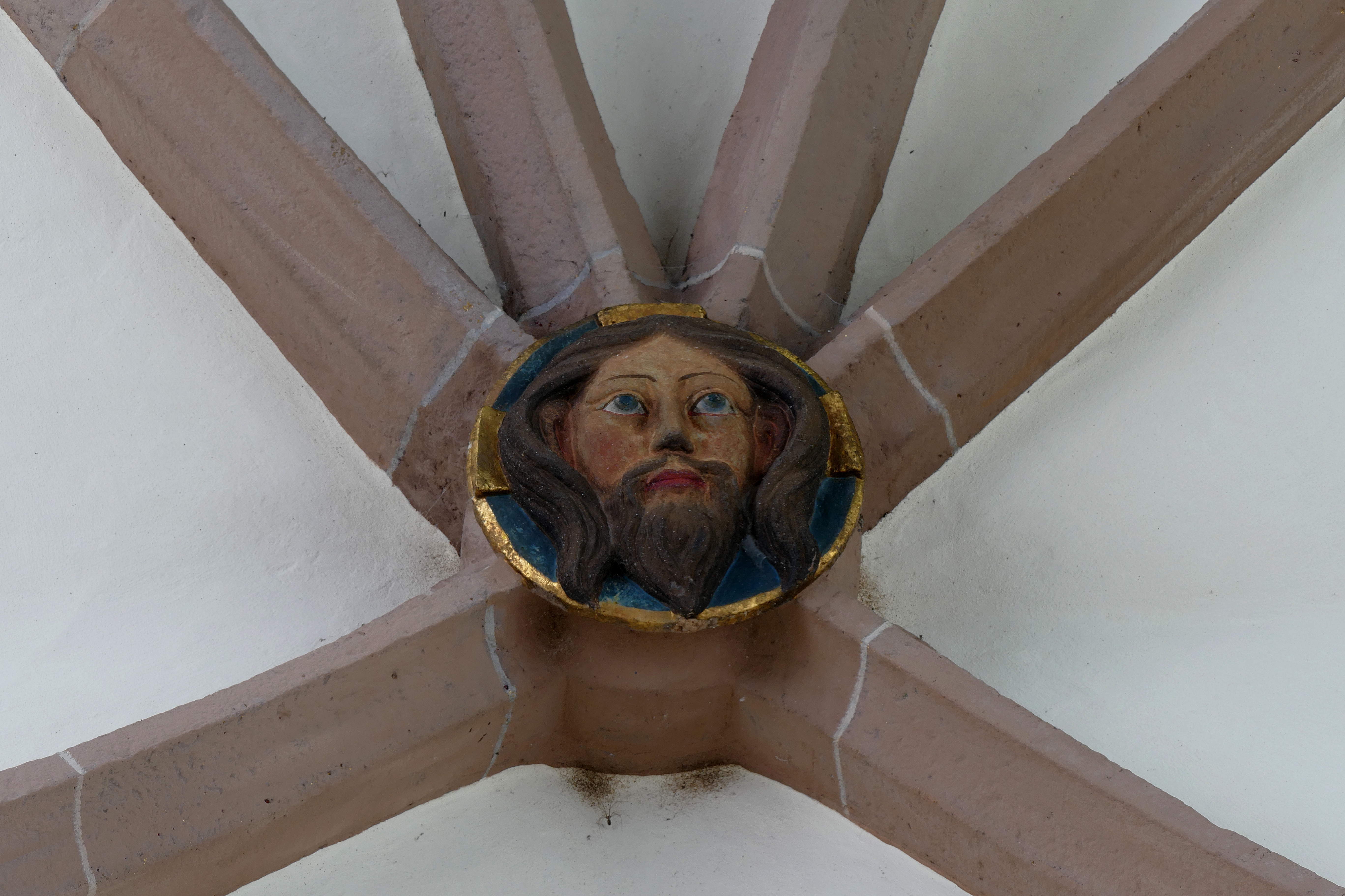 Alsace, Bas-Rhin, Chapelle Saint-Sébastien de Dambach-la-Ville (PA00084677, IA00115228). Clé de voûte gothique.